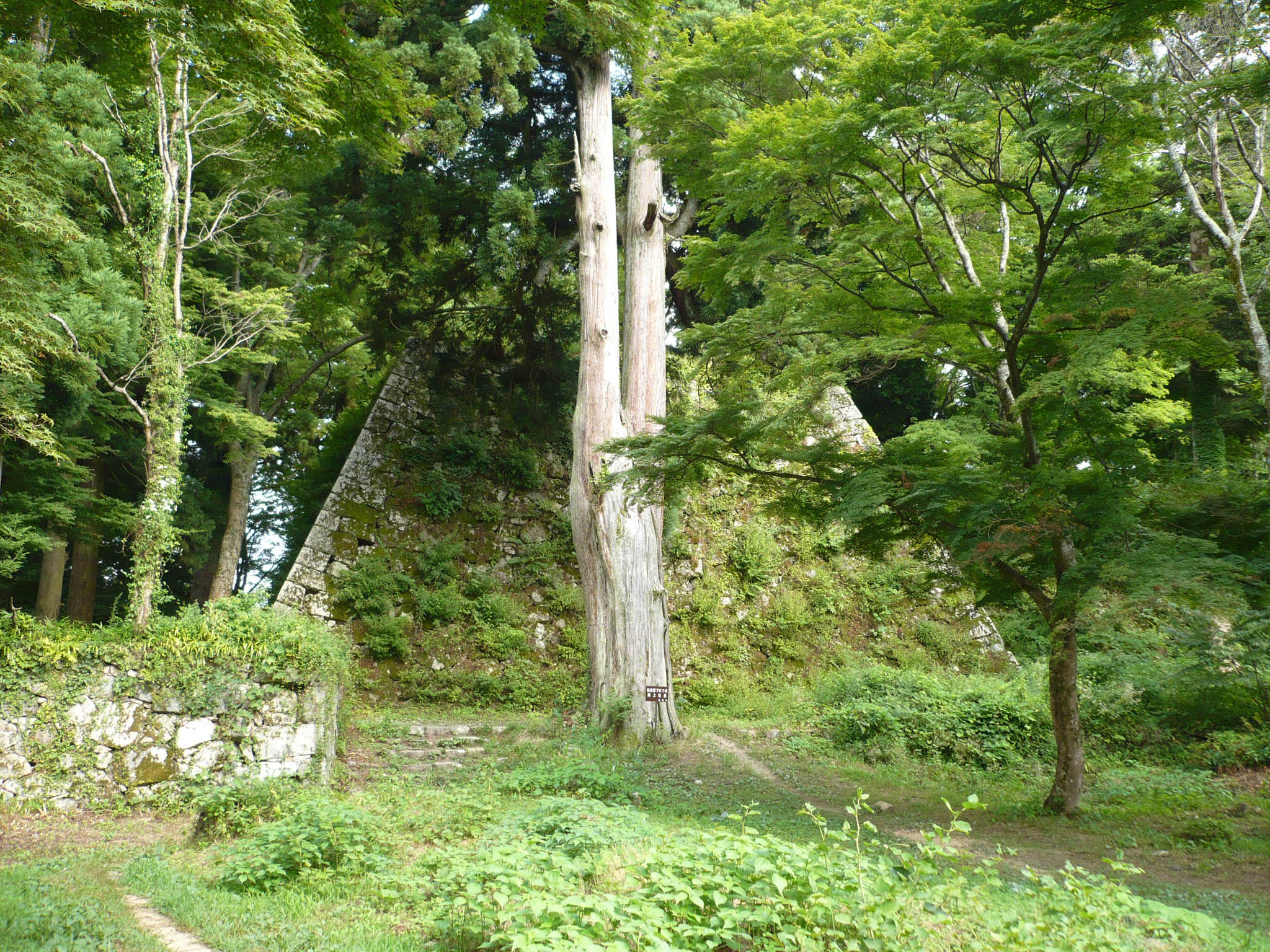 高取城の天守台